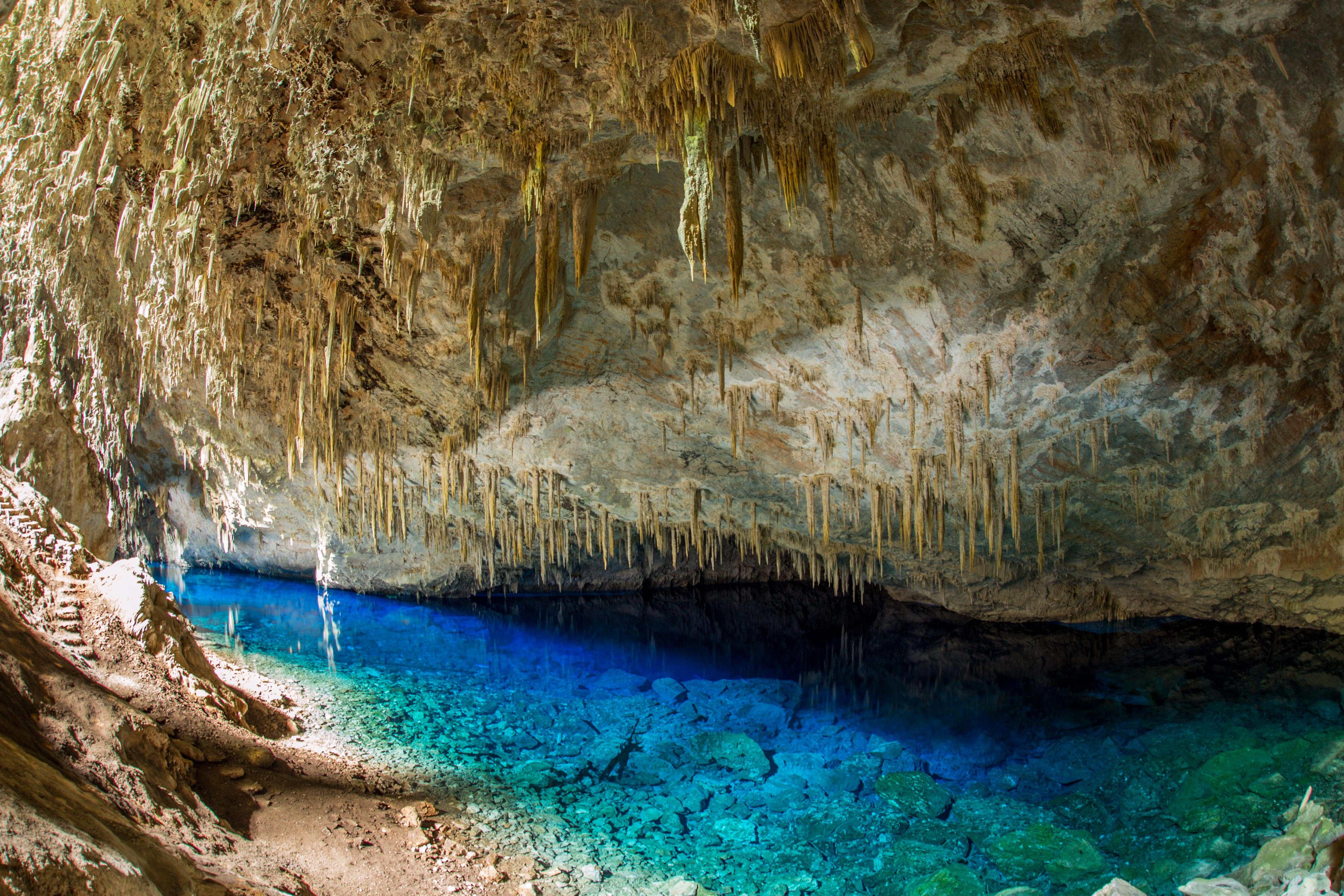 A Gruta do Lago Azul em Bonito • Parque Nacional da Serra da Bodoquena